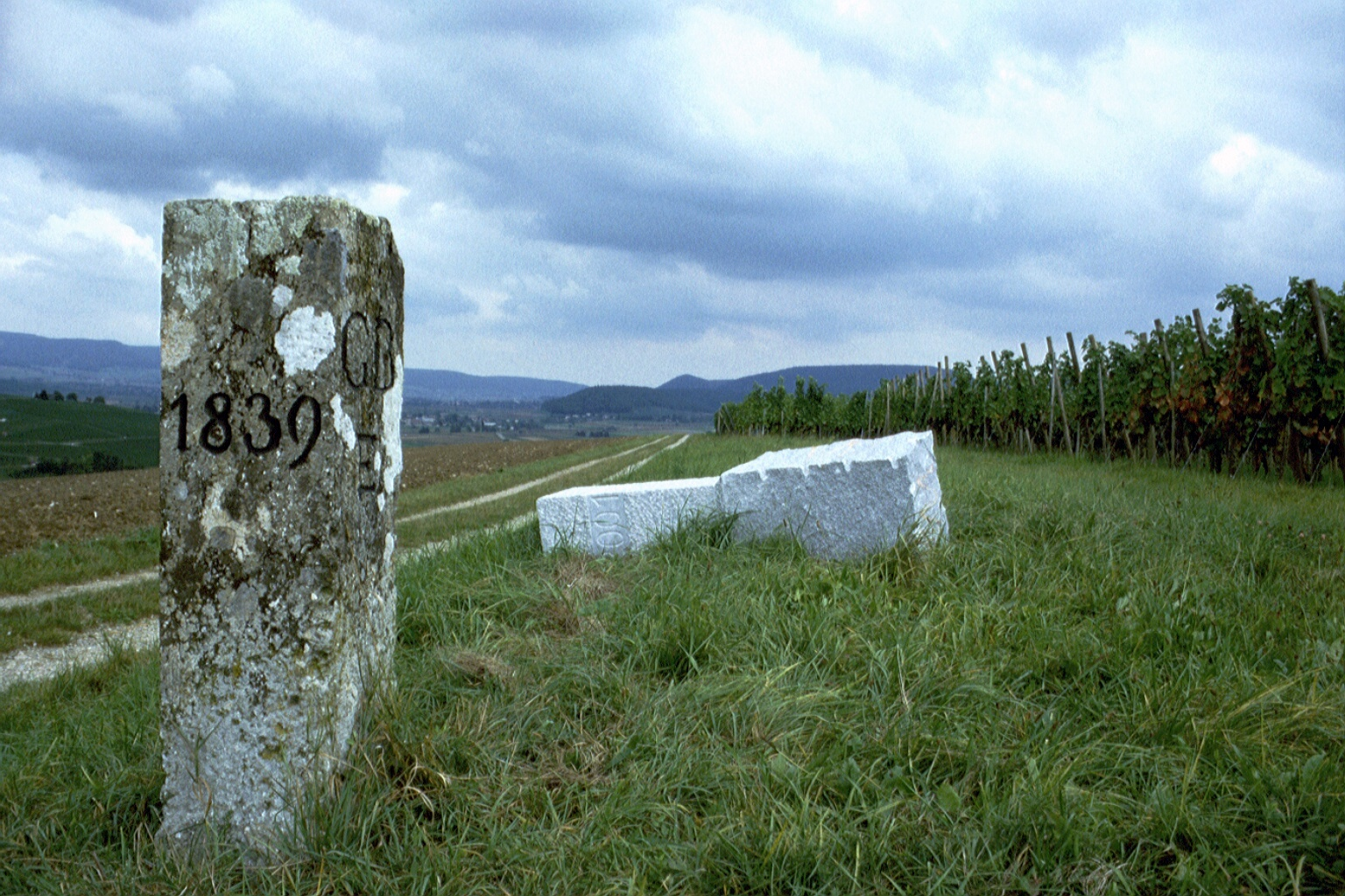 Rebberg (Grenzweg zur Schweiz) in Erzingen, Klettgau (Gemeinde), Landkreis Waldshut, Baden-Württemberg.